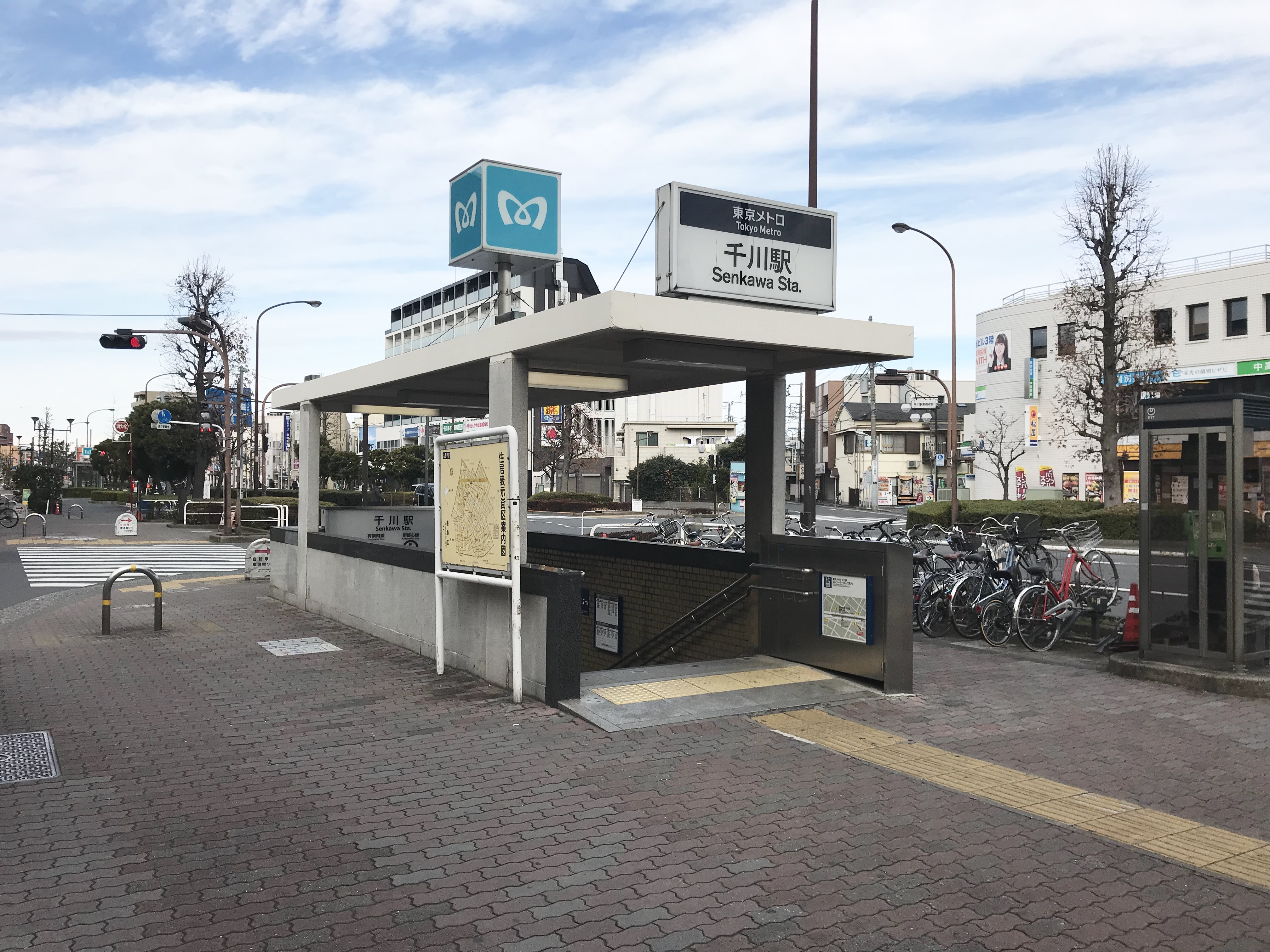 東京メトロ有楽町線・副都心線千川駅3番出入口